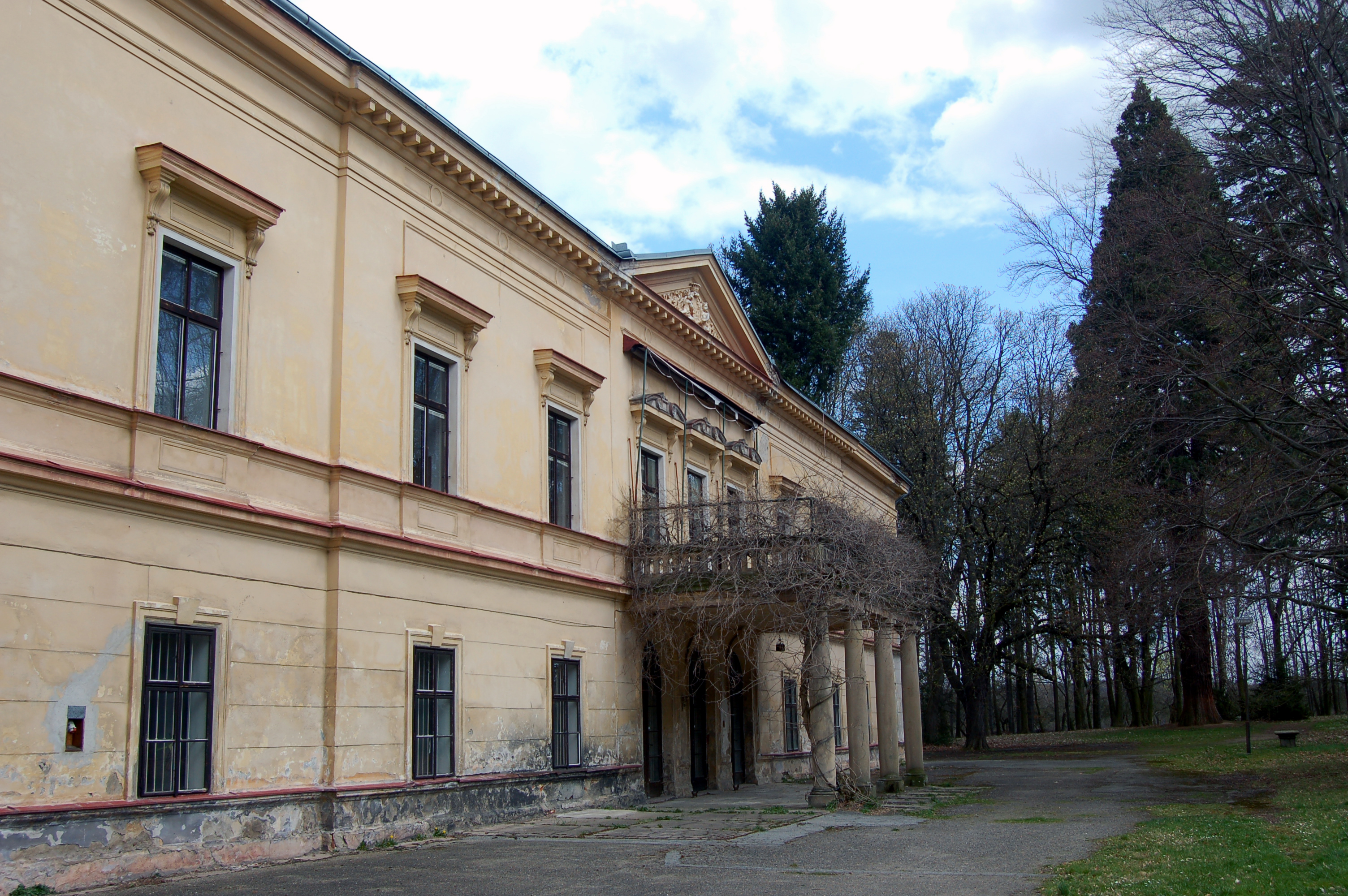 Chateau Ratměřice (district Benešov), Czechia